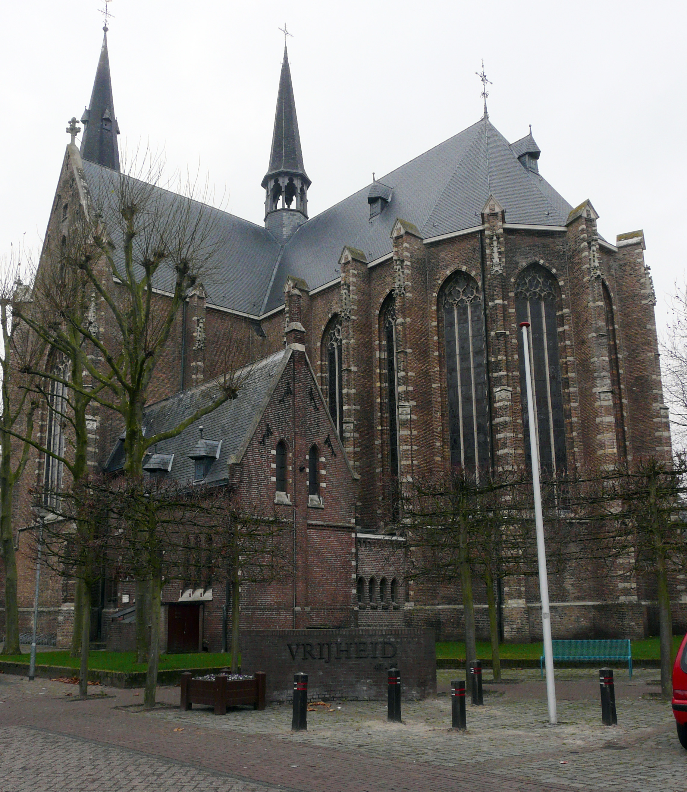 Zicht op de St. Antonius Abt gevestigd aan de Marktstraat 4 in het centrum van Terheijden in de provincie Noord-Brabant